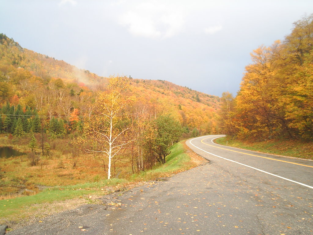 sub7anallah